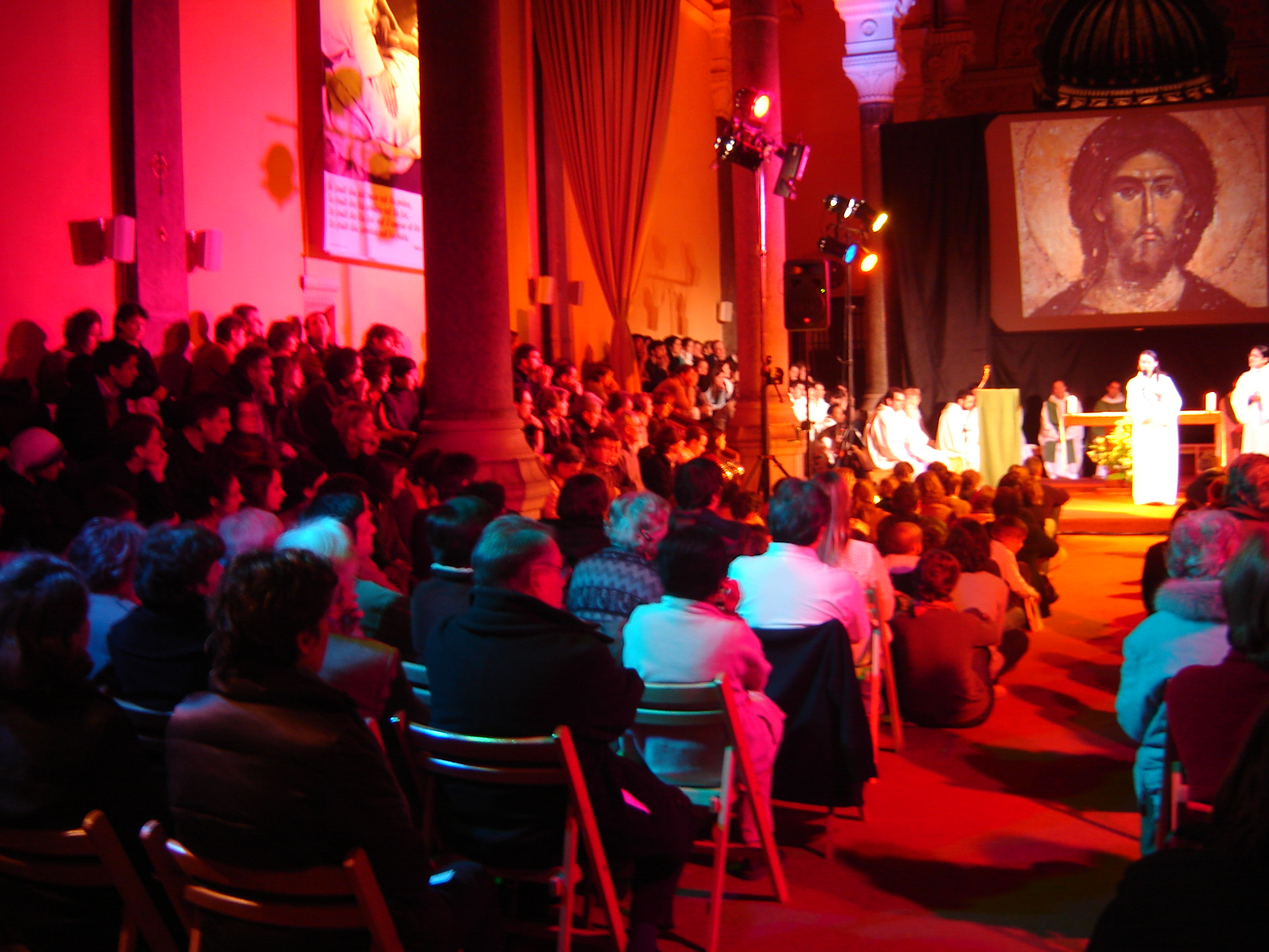 Messe dans la chapelle Paul-Couturier de Lyon, en 2007.